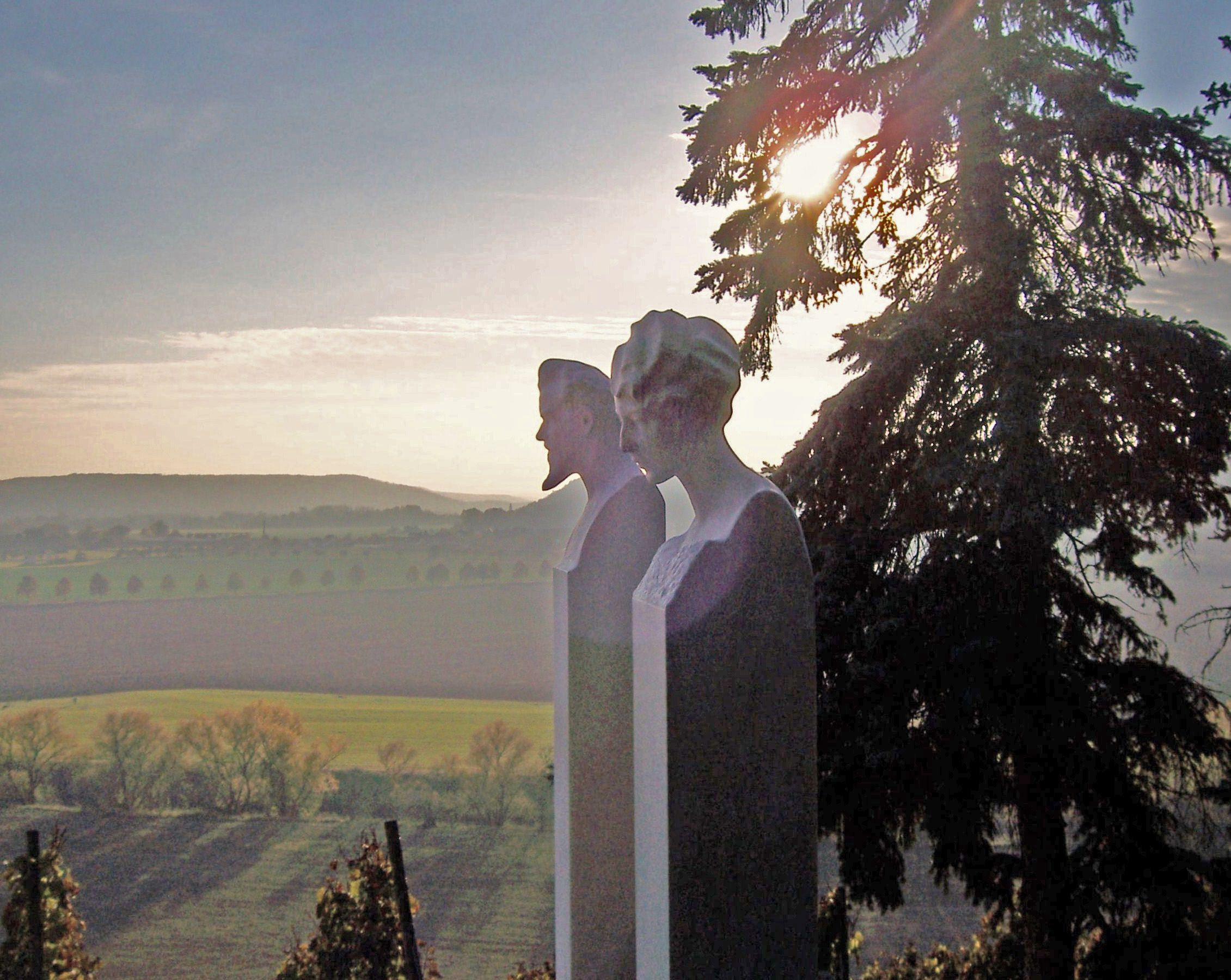 Marmorhermen von Max Klinger und Gertrud Klinger, geb. Bock Detail der Grabanlage für Max Klinger in Großjena, Entwurf: Johannes Hartmann